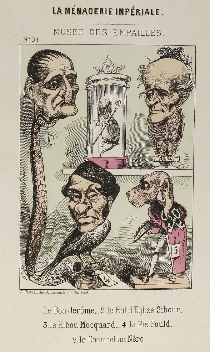 "Musée des empaillés" (3/3).